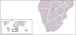 Description:Carte de localisation du bantoustan du Caprivi Oriental, Namibie Auteur:Rémih